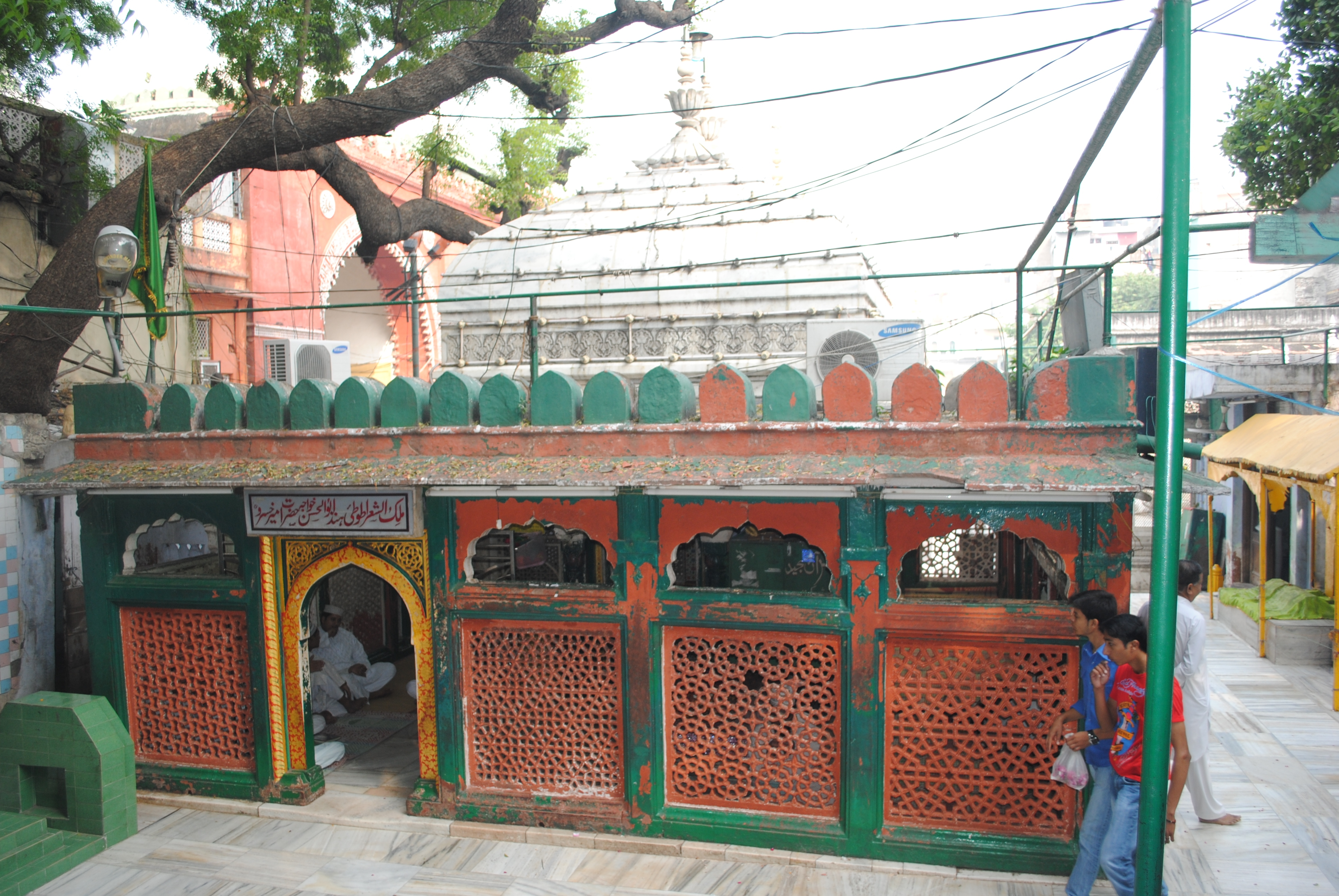 مقبره امیر خسرو دهلوی در مجموعه درگاه نظام‌الدین اولیاء٬ دهلی Mausoleum of Amir Khusrow Dehlavi, Nizamuddin Auliya Complex, Delhi